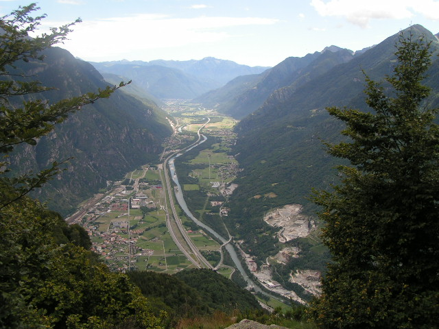 La Valle Riviera da Biasca a Bellinzona